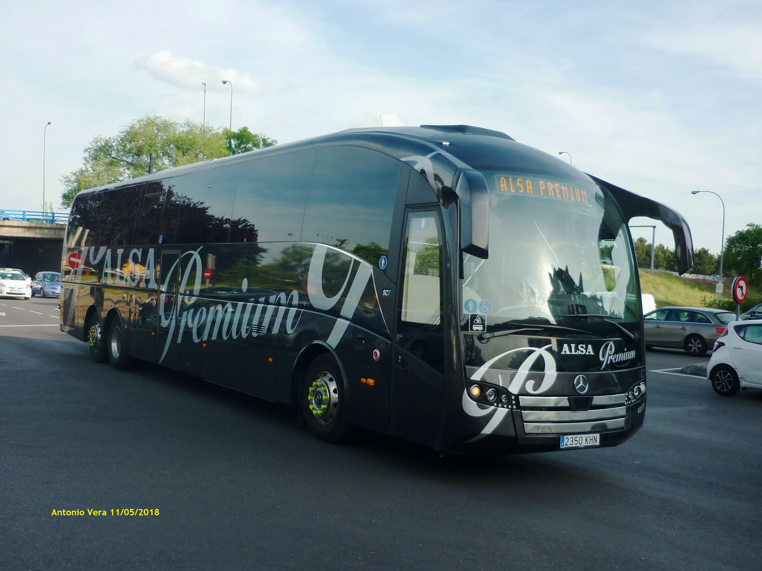 4817_ALSA